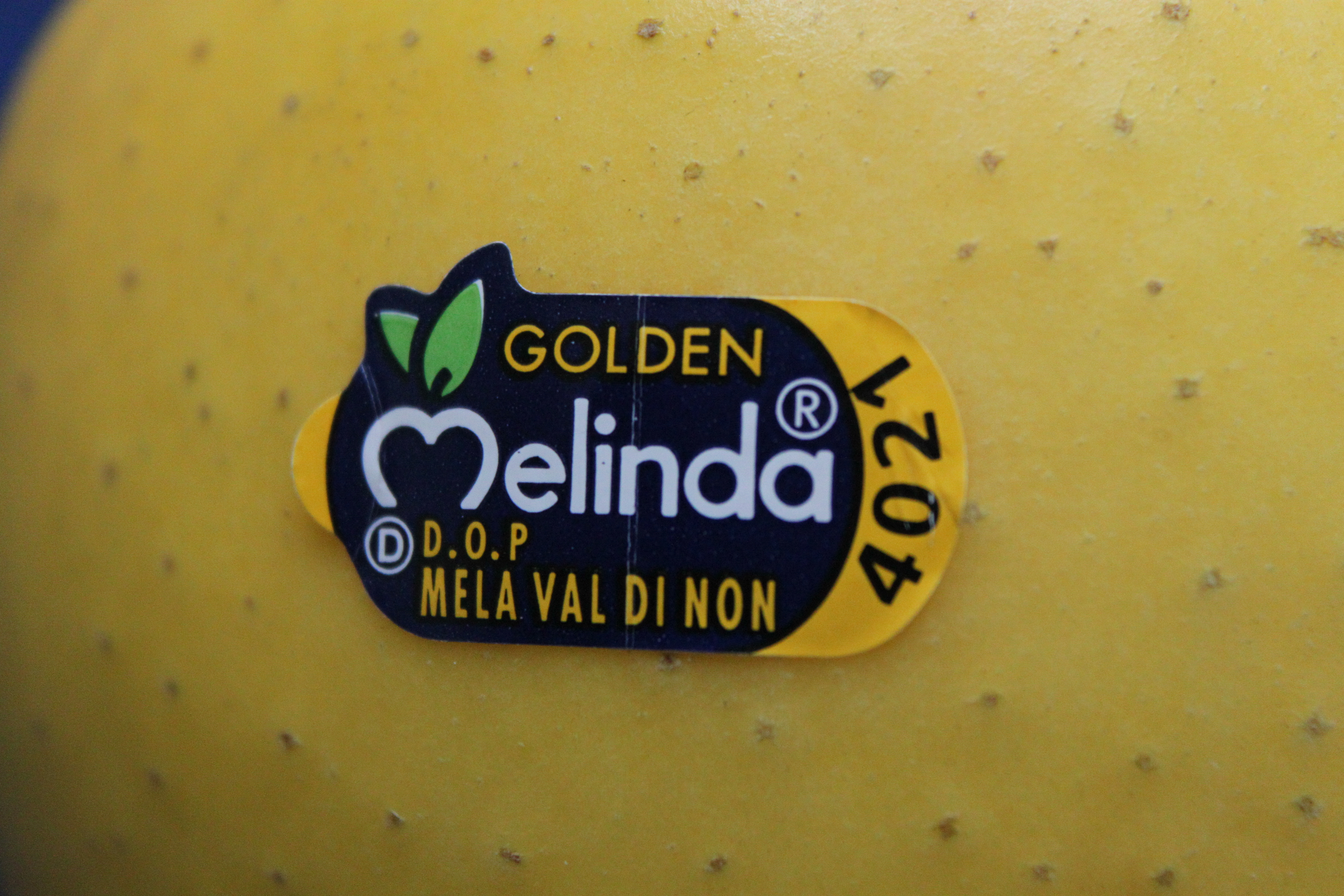 DOP; Denominazione d’Origine Protetta; Apfel